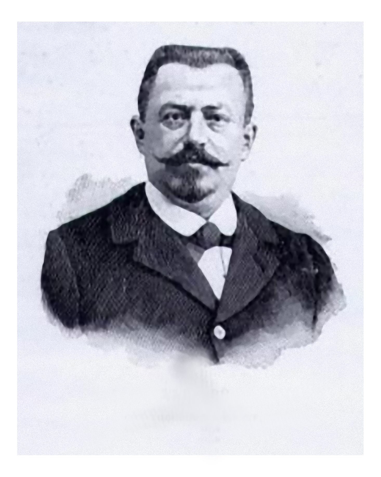 Gaston Barré (1899)